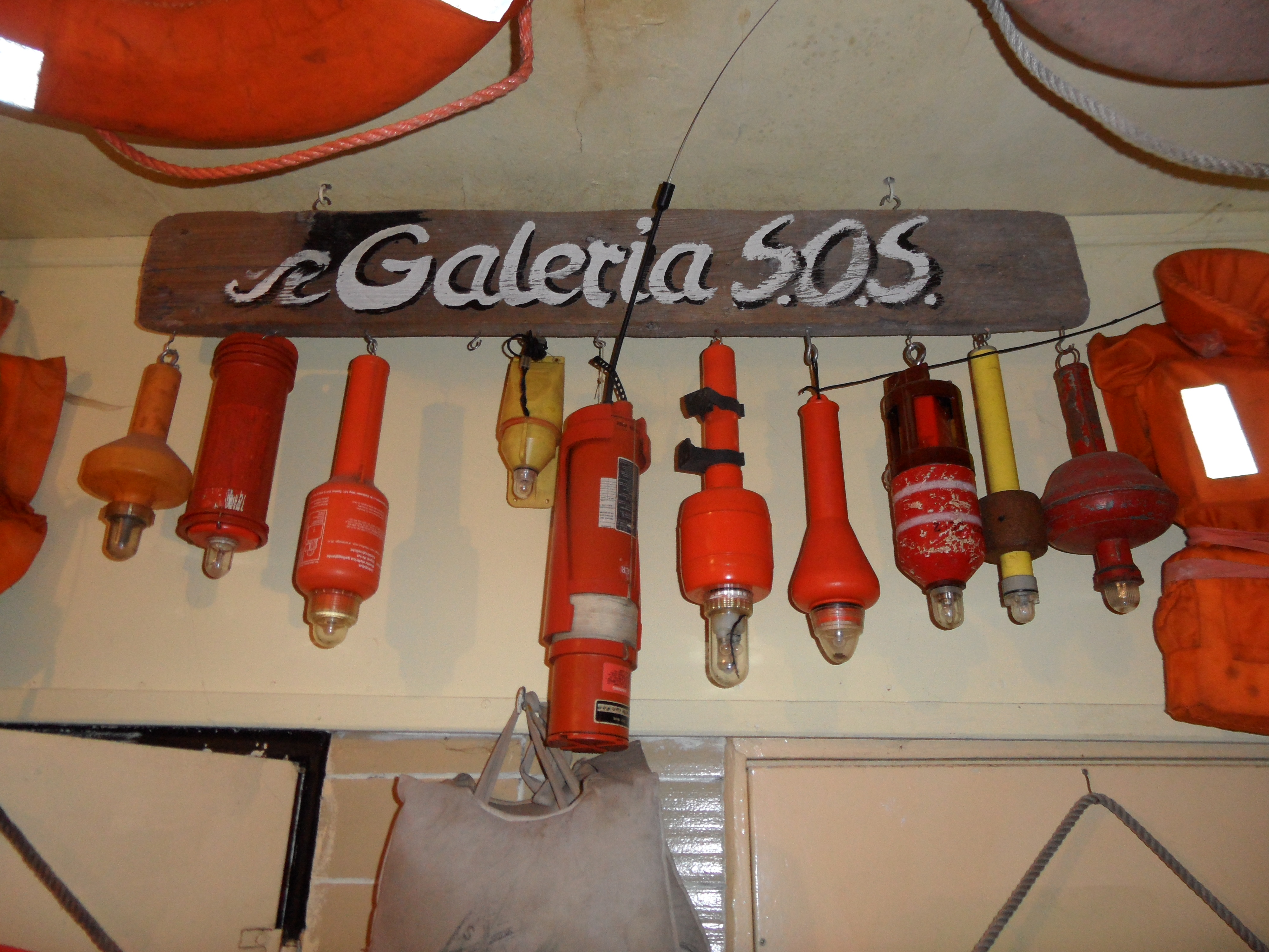 Pławy ratunkowe w Klubie Zejman w Gdańsku